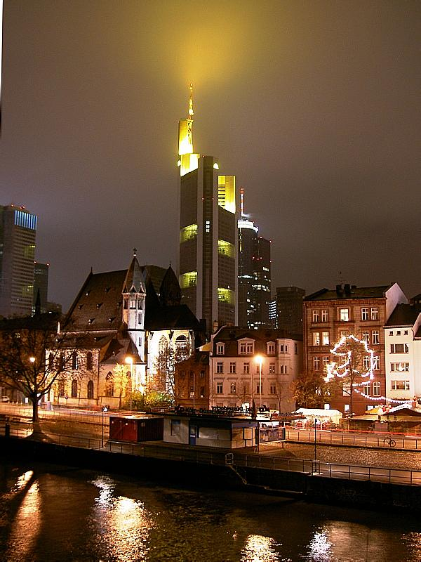 Frankfurt (Main) Commerzbank-Zentrale eigenes Foto 28.11.2004 Aufnahme Benutzer:Heidas|Heidas (?)